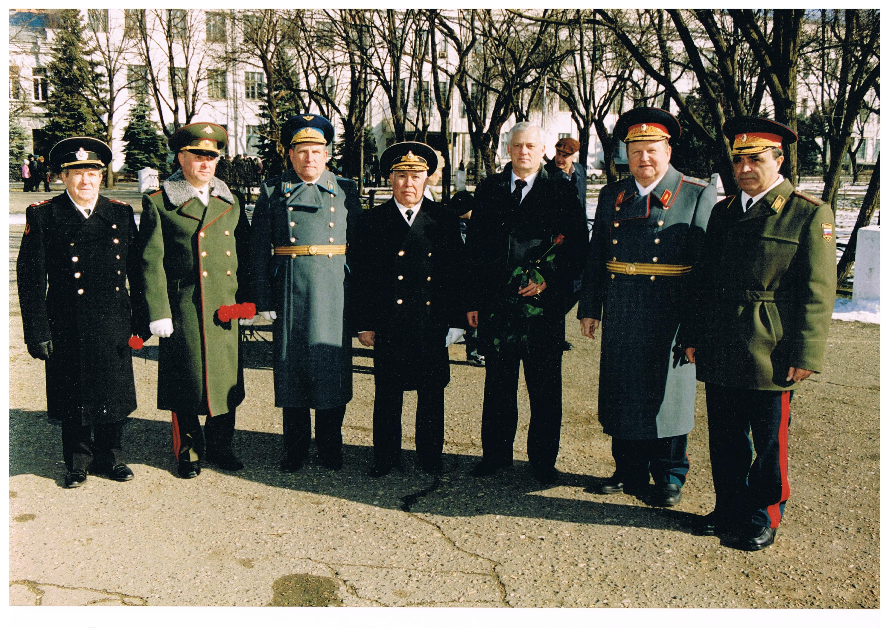 Герой_Советского_Союза_Гурьев_М.Н._и_генералы_из_Адыгеи._Майкоп_23.02.2003_год..jpg